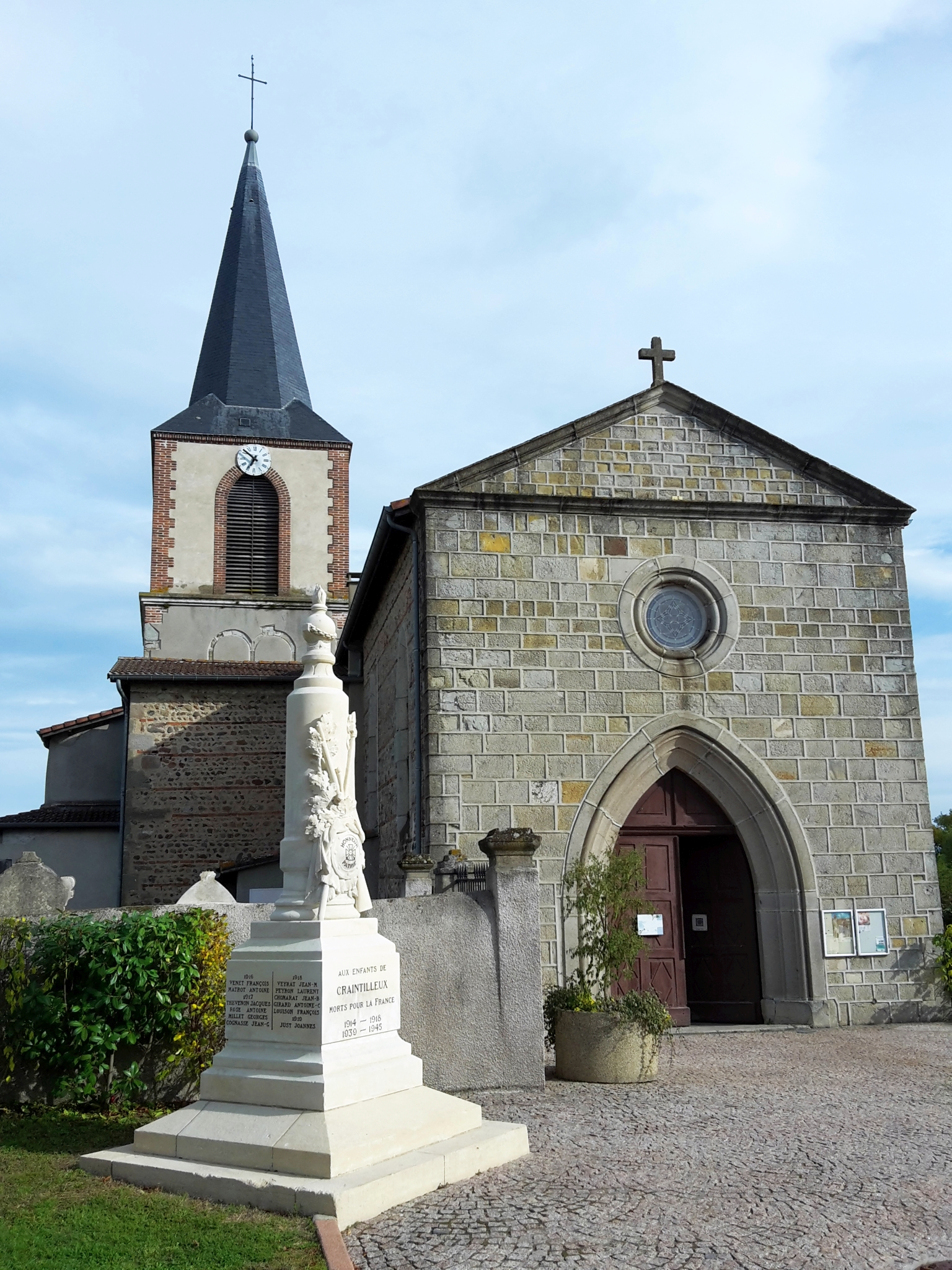 Format portrait de l'église de Craintilleux